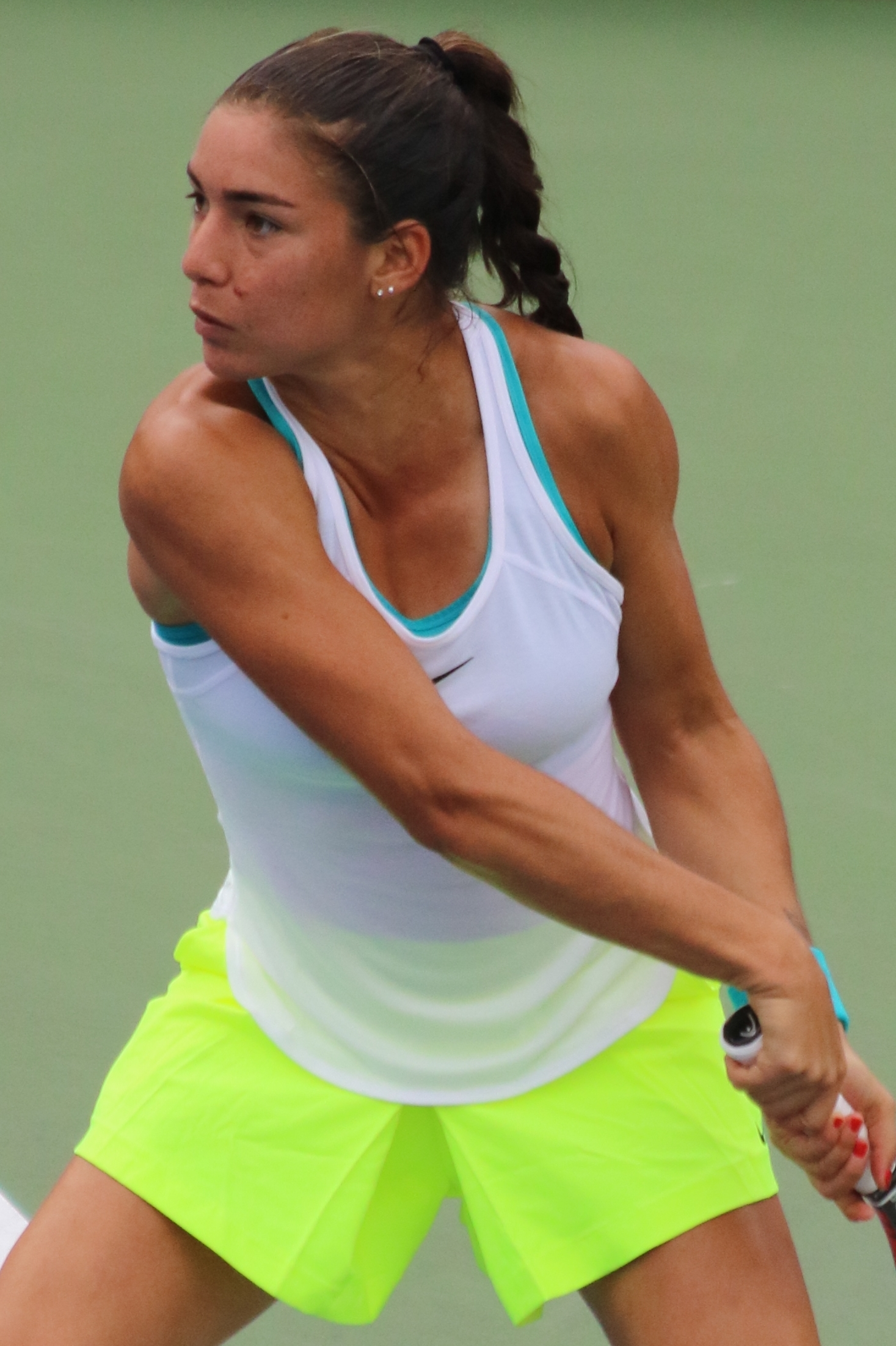 Gonzalez M. US16 (21)